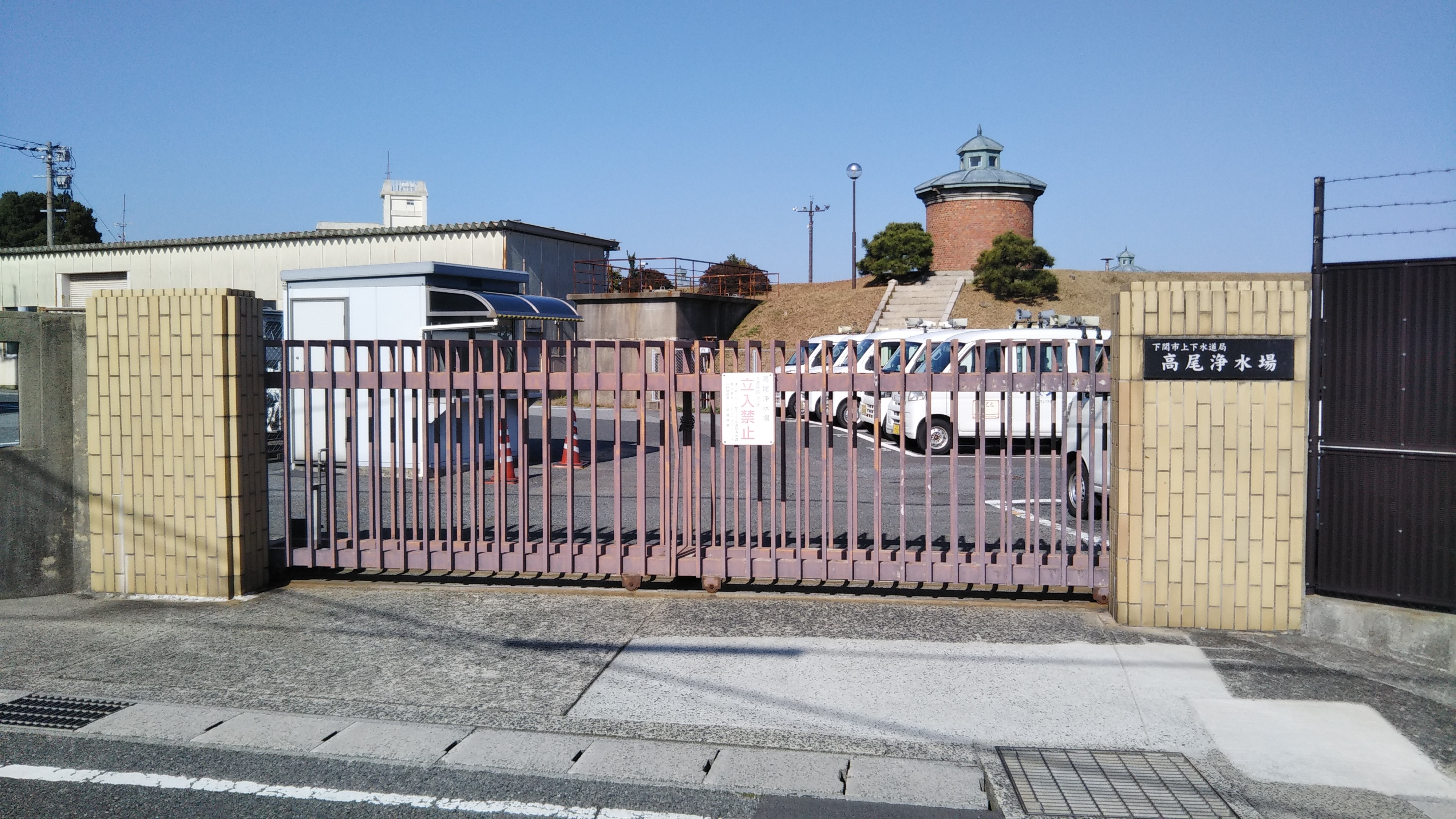 高尾浄水場入口。山口県下関市春日町に所在。下関市上下水道局と隣接している。